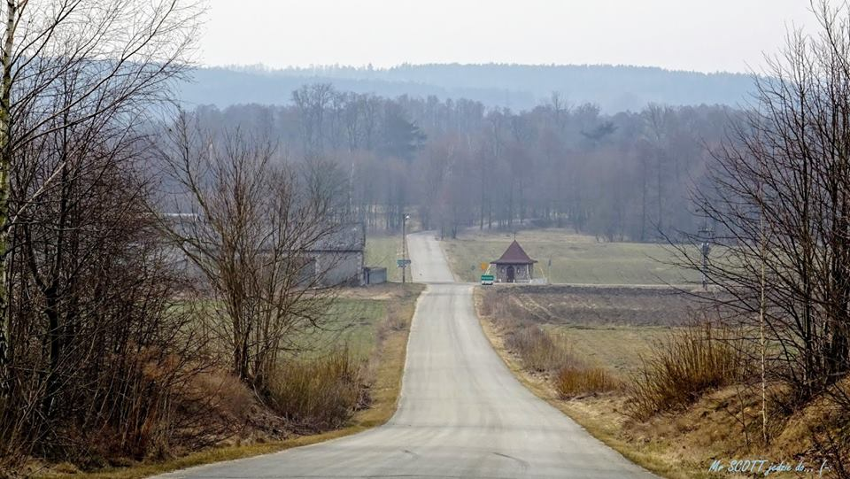 Zdjęcie przedstawia drogę łączącą Jankowice i Białynin na odcinku na którym widać skrzyżowanie z drogą przebiegająca przez Kochanów.